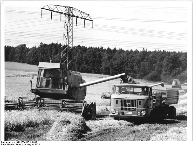 KAP Zossen, Getreideernte, Ablassen von Korn ADN-ZB Liebers-19.8.73 Bez. Gera: Jugendliche meistern moderne Technik. Diesen aus fünf modernen Komines bestehenden Mähdrescherkomplex haben die Jugendlichen der Kooperation Zossen im Landkreis Gera als Jugendobjekt in ihre Regie genommen. Im zweischichtigen Einsatz meistern sie mit Versantwortungsbewusstsein und Elan die moderne Erntetechnik. (Vergl. hierzu M0819-3N).